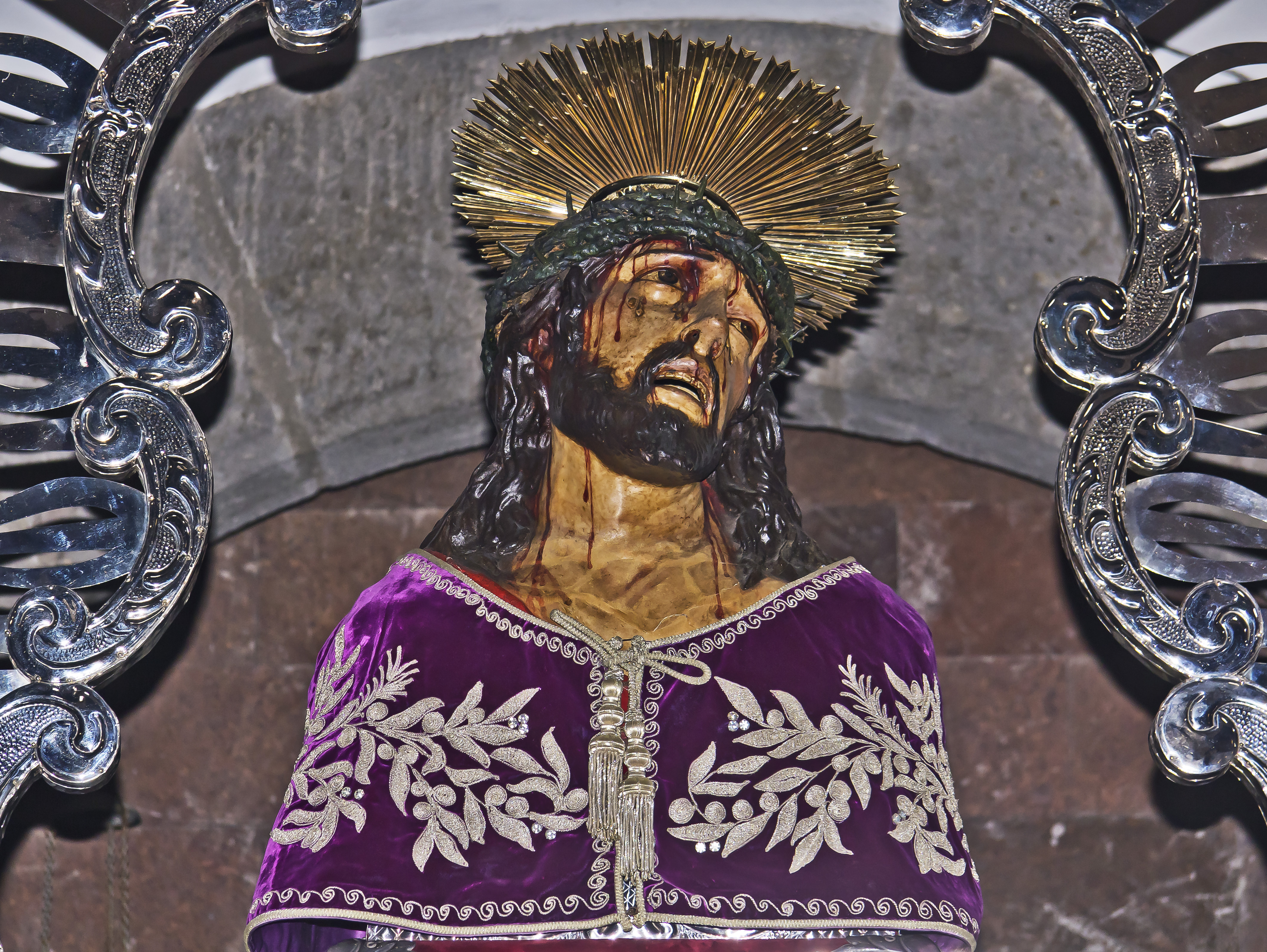 Die Figur des „Señor de las Tribulaciones“ befindet sich hier auf der Transporteinrichtung für die Prozession in der Karwoche in der Kirche San Francisco in Santa Cruz de Tenerife.